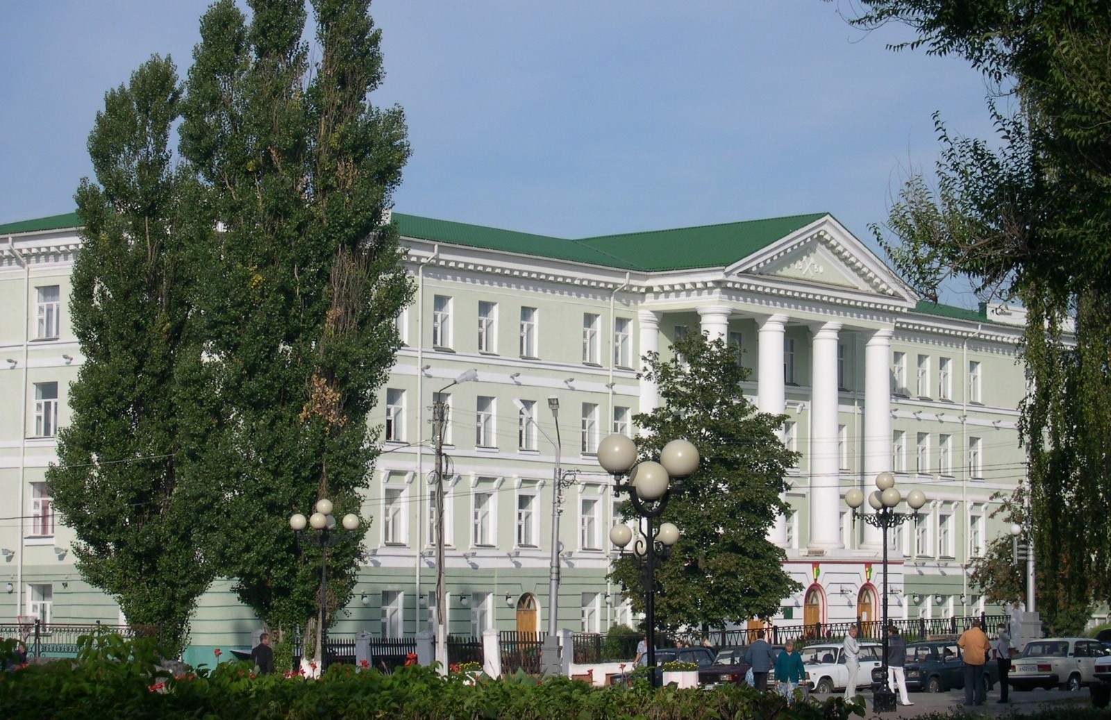 Дом, в котором находился эвакуационный госпиталь № 1926 (Белгородская область, Старый Оскол, улица Ленина, 14/13)